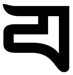 пха